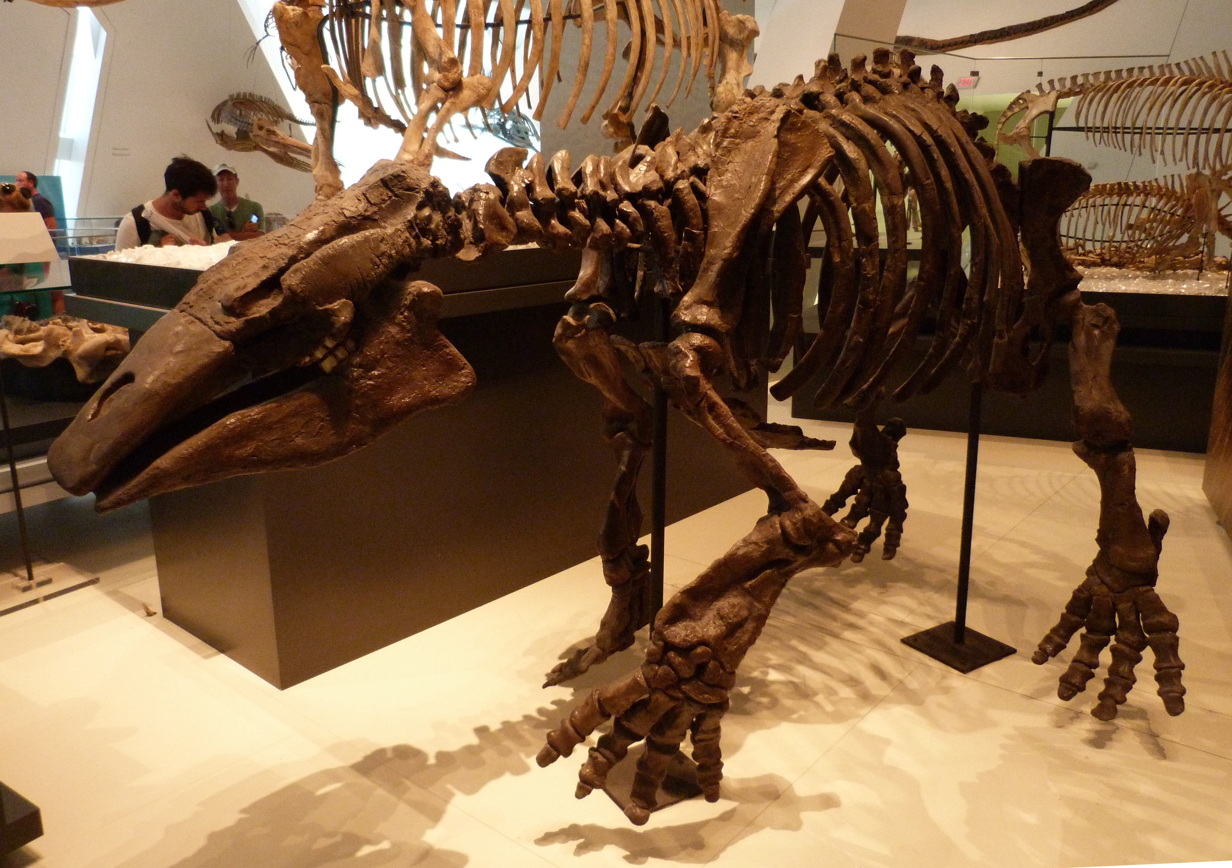 Royal Ontario Museum, Toronto, Canada